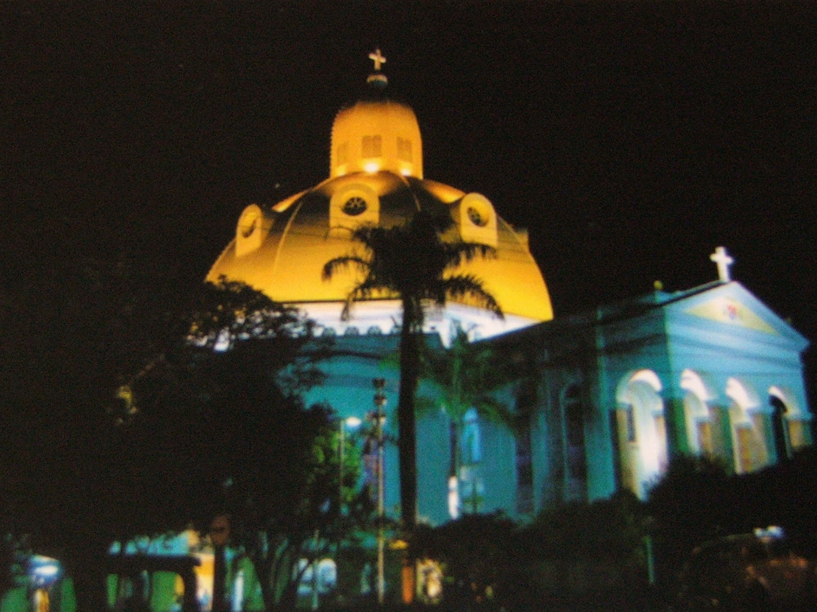 Catedral de São Carlos Borromeu, São Carlos-SP, Brasil, com nova iluminação.